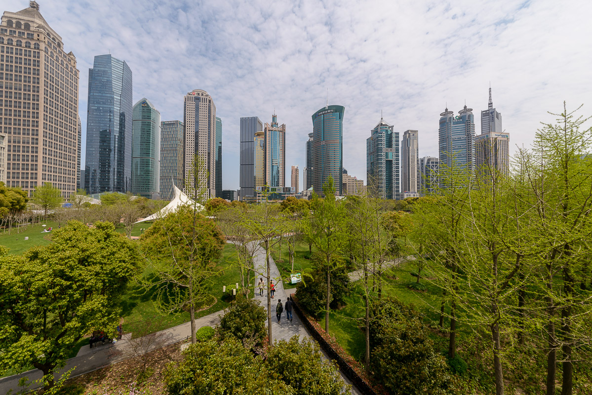 Shanghai, Pudong, Lujiazui